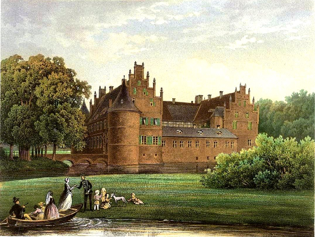 Schloss Herten